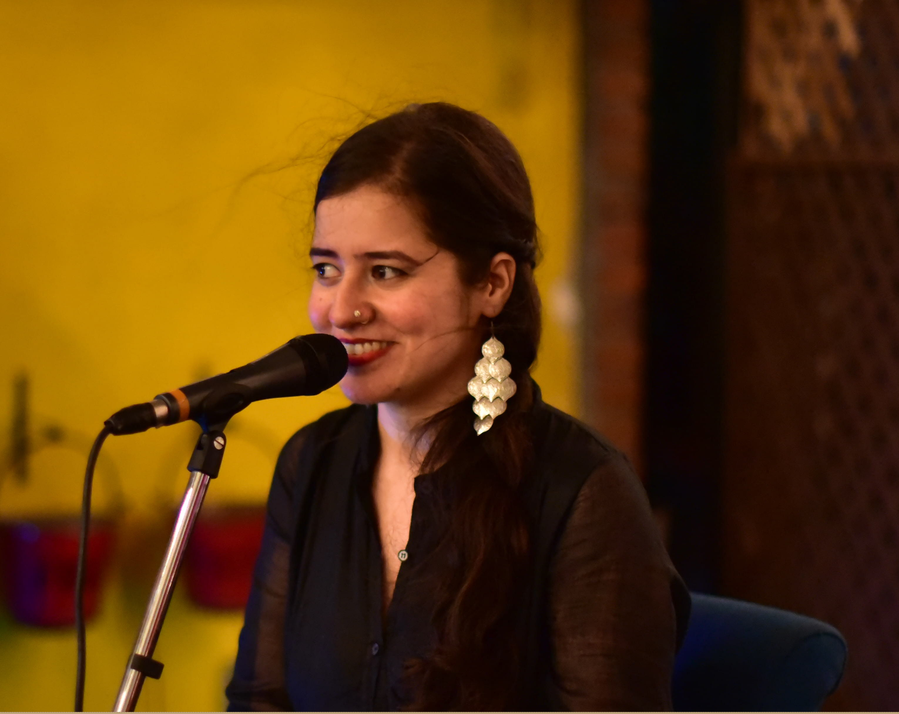 Vibha Saraf